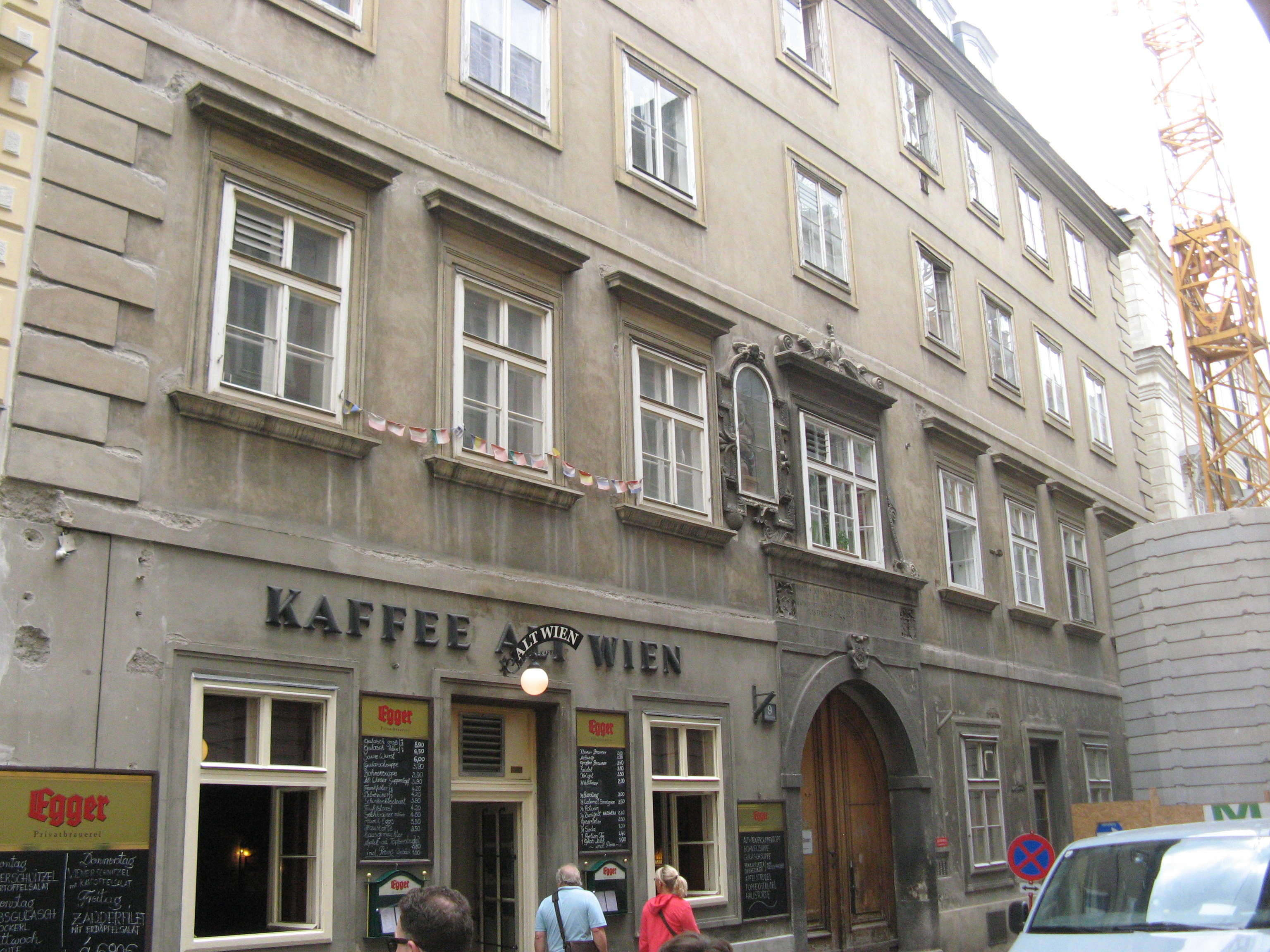 Windhagsches Stiftungshaus, Bäckerstraße 9, Wien-Innere Stadt